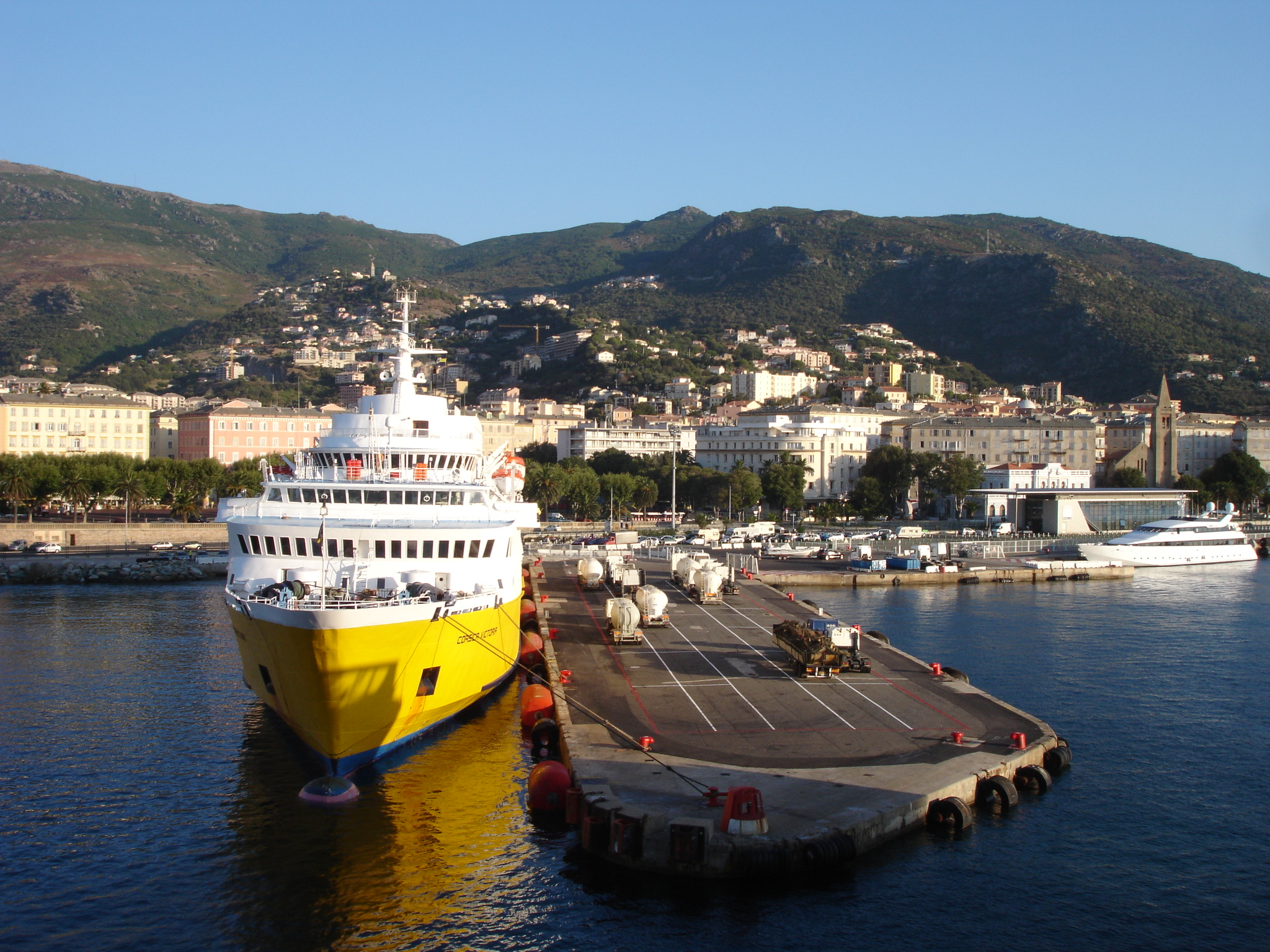 France, Haute-Corse (2B), Bastia, sardinia ferries dans le port; Corsica Victoria